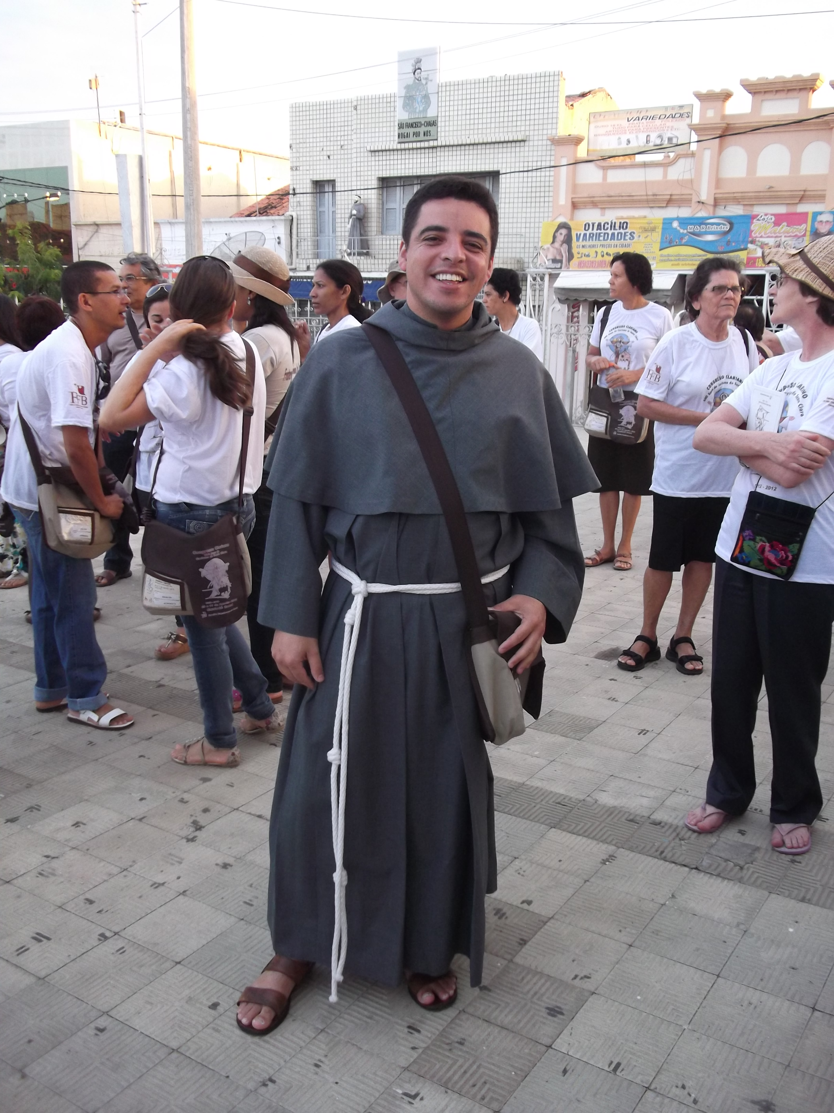 Congresso Clariano (Canindé (Brasil), 9 a 11 ago. 2012)